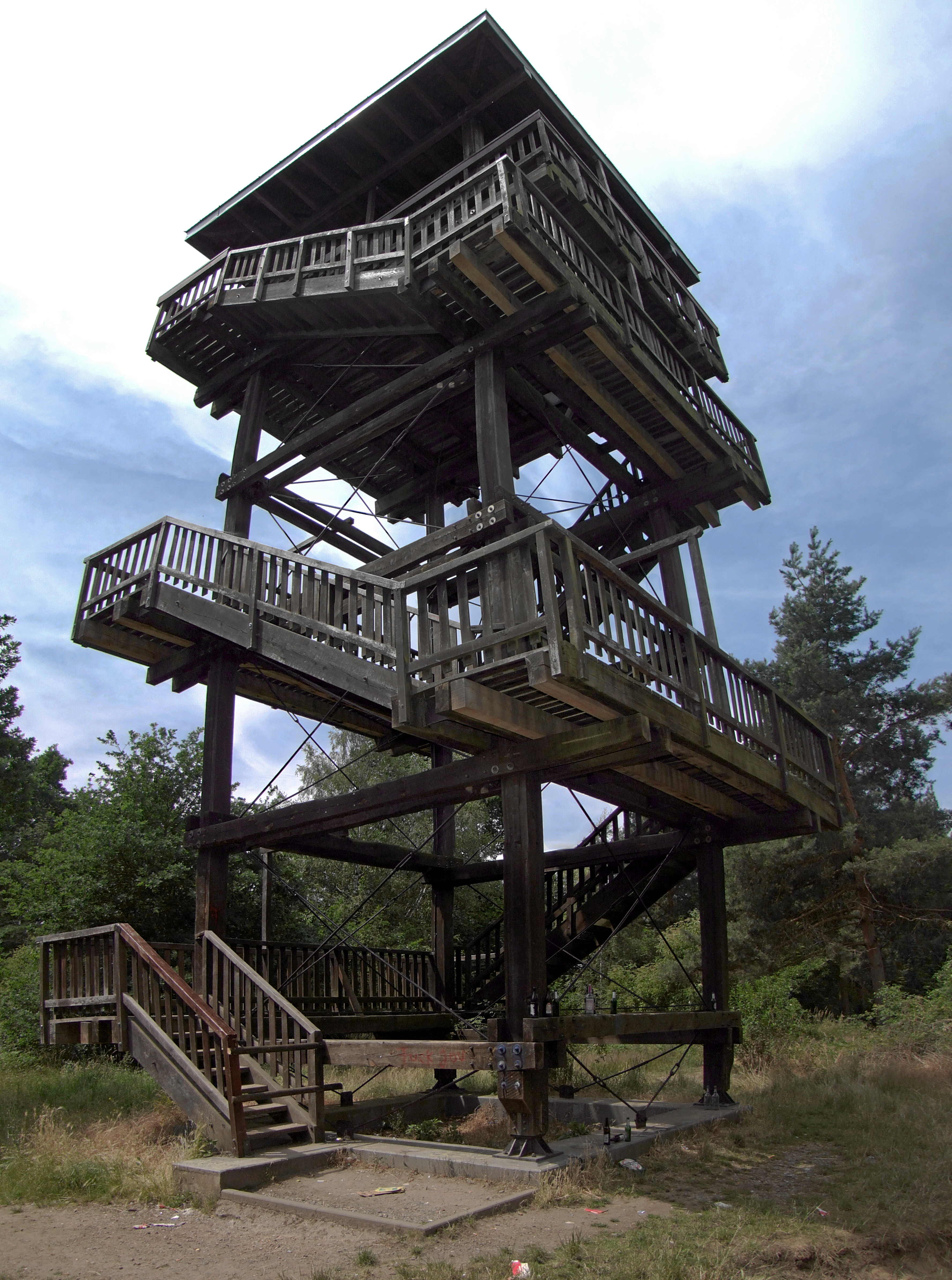 Turm am Kulk, 22.06.2008, 12_34Uhr